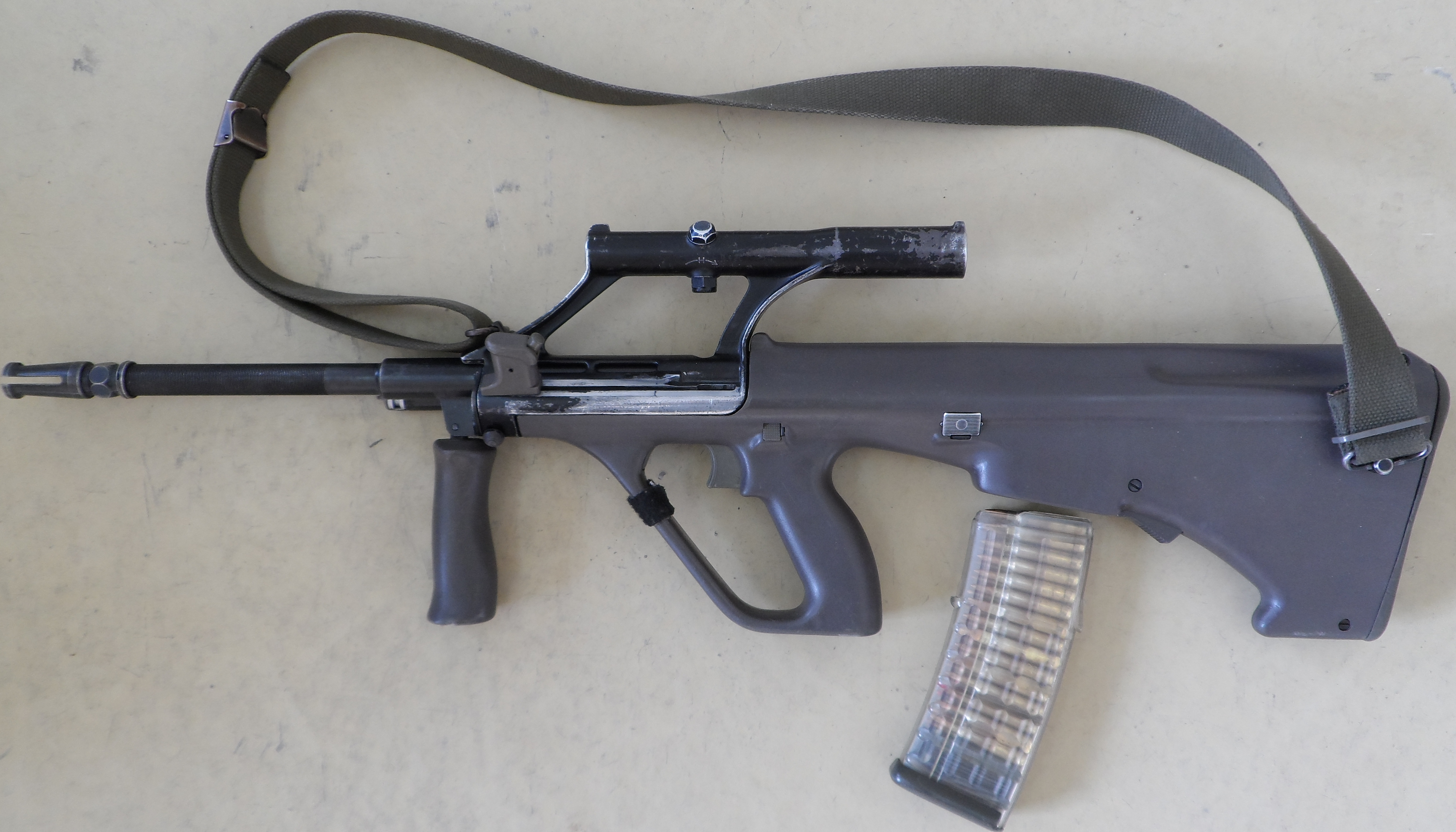 5,56 mm Steyr AUG (StG 77)